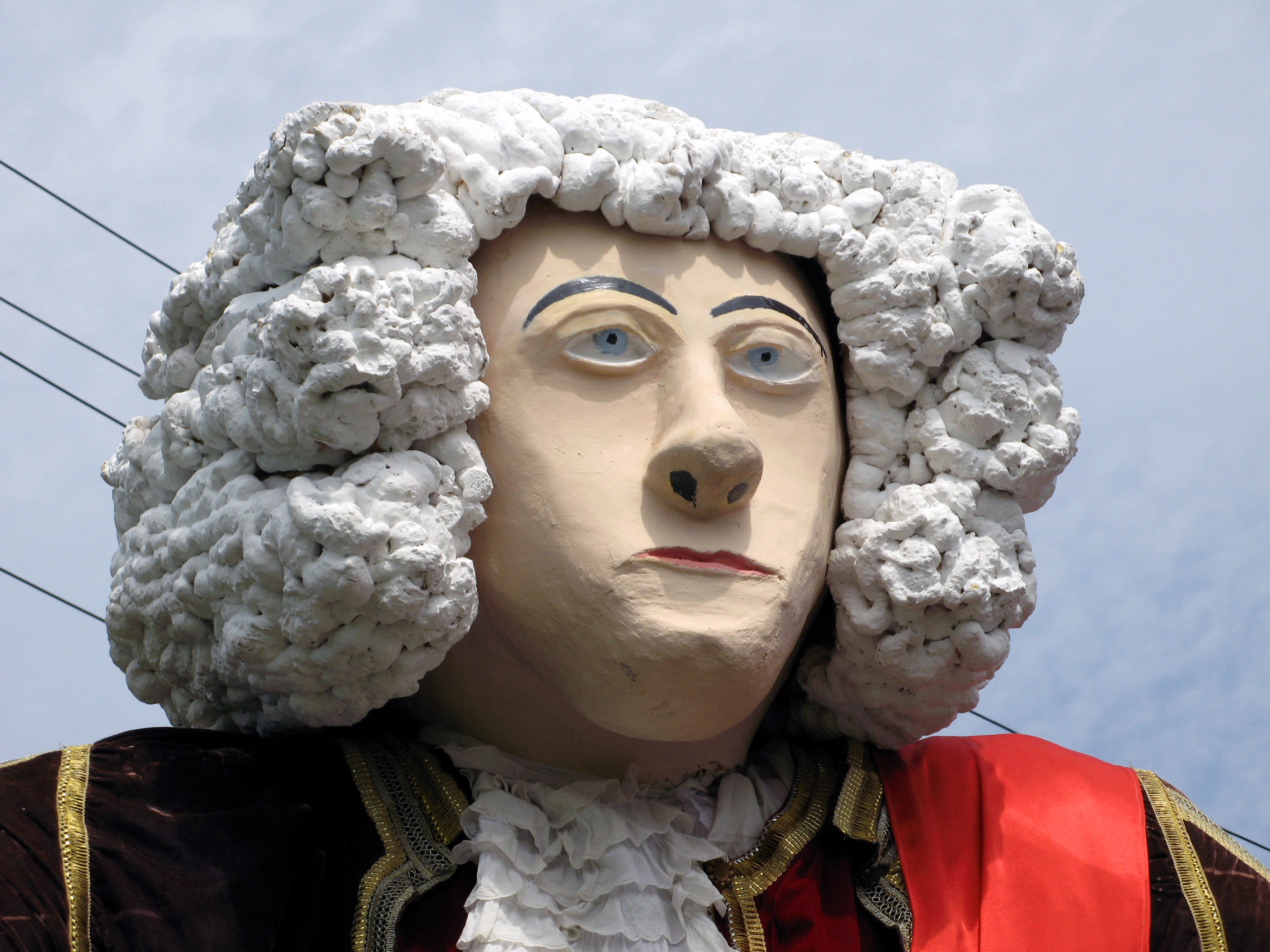 Guesnain (Nord, France) - Animation festive au centre-ville, un dimanche de printemps. Dans la rue Francisco Ferrer (à proximité immédiate de la Mairie, derrière l'ancienne brasserie), les géants attendent avec leurs accompagnateurs le départ de la parade. On voit ici Dupleix. .